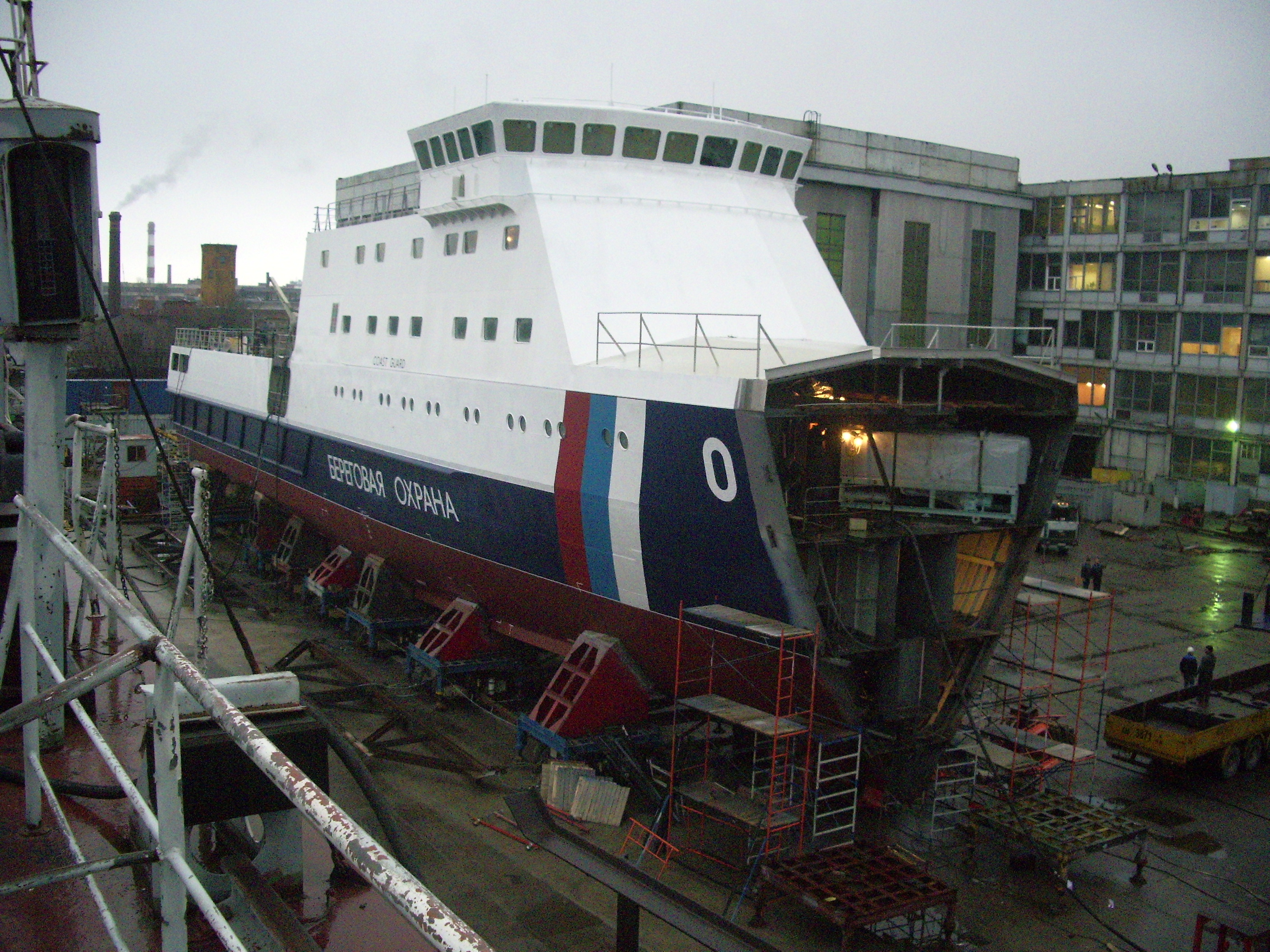 С.З."Алмаз" для Азовской флотилии.